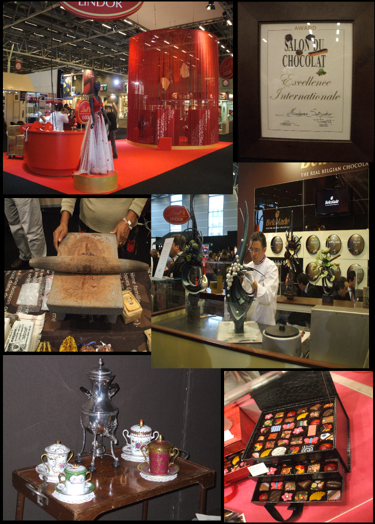 mixe de photos prise au salon du chocolat 2008 1: entrée du salon, 2: récompense, 3 :mortier à chocolat, 4: chocolatier en train de travailler, 5: service à chocolat, 6: bonbons en chocolat de la maison duroc-danner